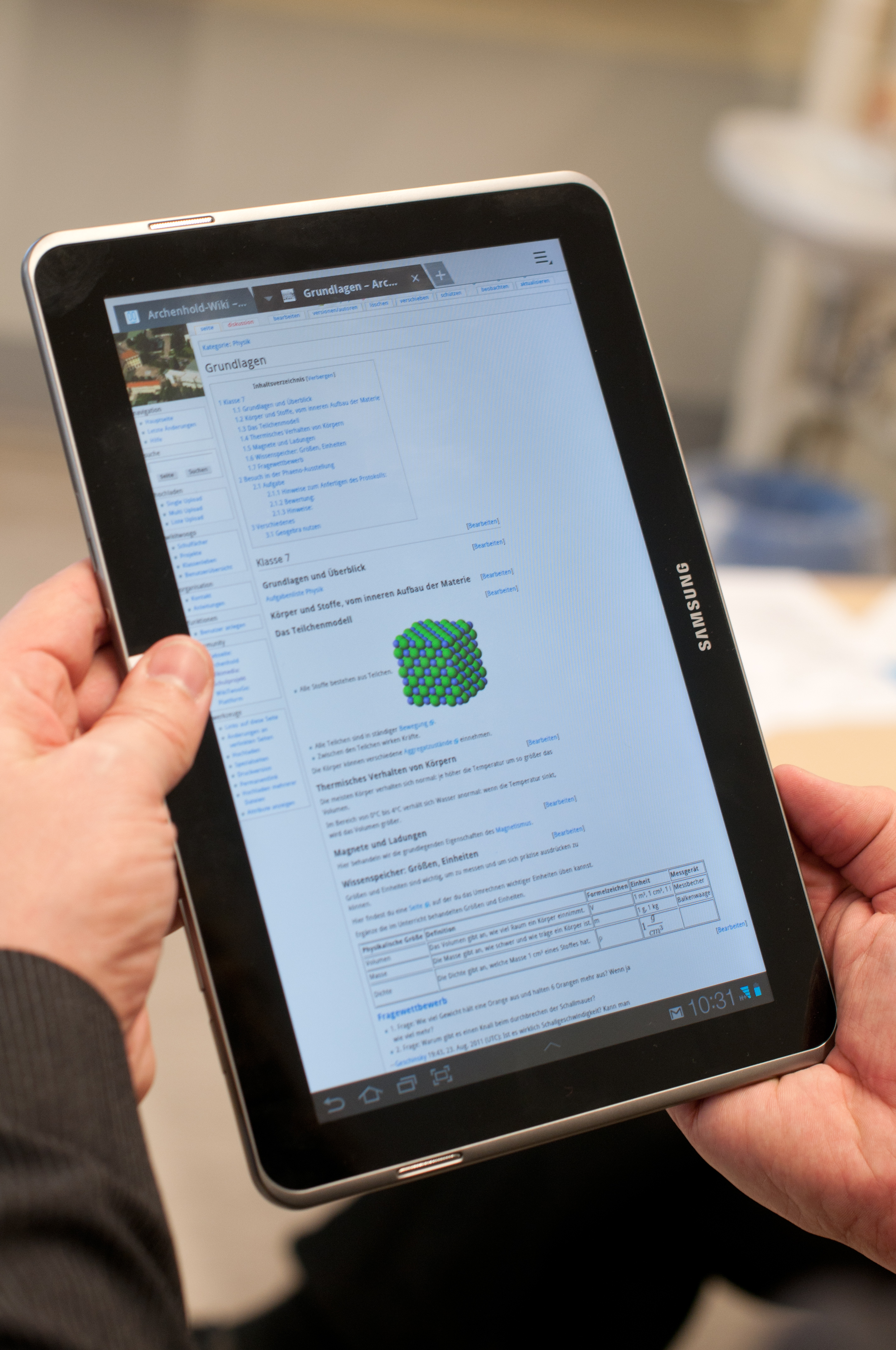 Pressetermin zum Einsatz von Wikis in der Ausbildung mit der Berliner Morgenpost in der [ Archenhold- Oberschule] Berlin- Treptoweine schriftliche Einverständniserklärung der Eltern zur Veröffentlichung der Fotos ihrer Kinder liegt vor.